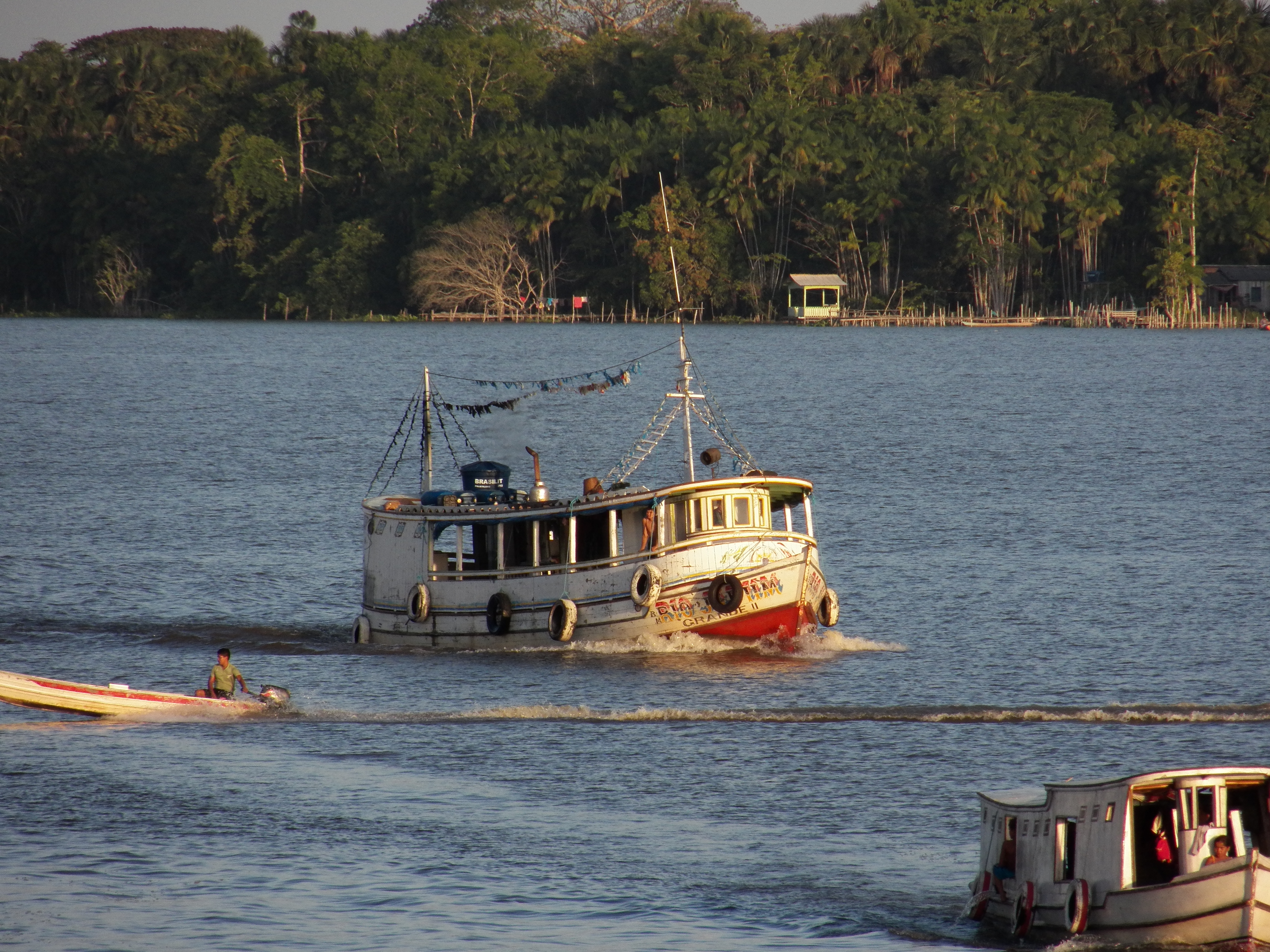 Rios do arquipélago do Marajó.